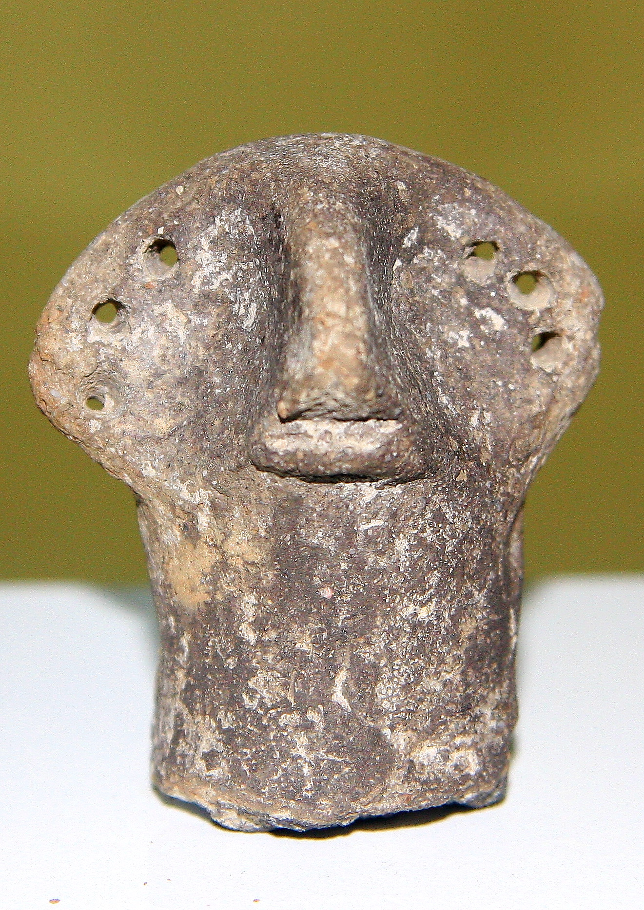 Gumelnita Art